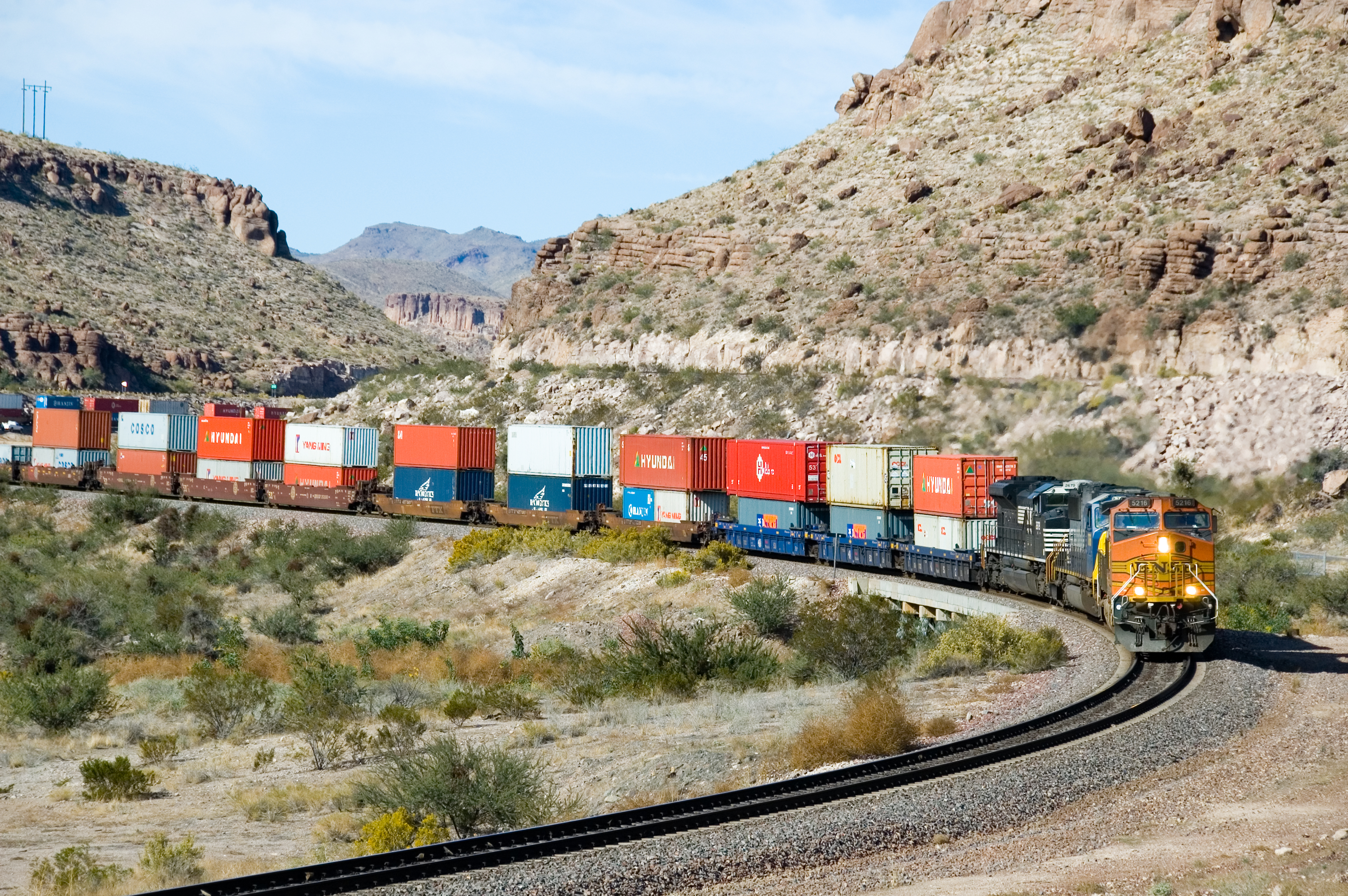 BNSF 5216 West Kingman Canyon AZ